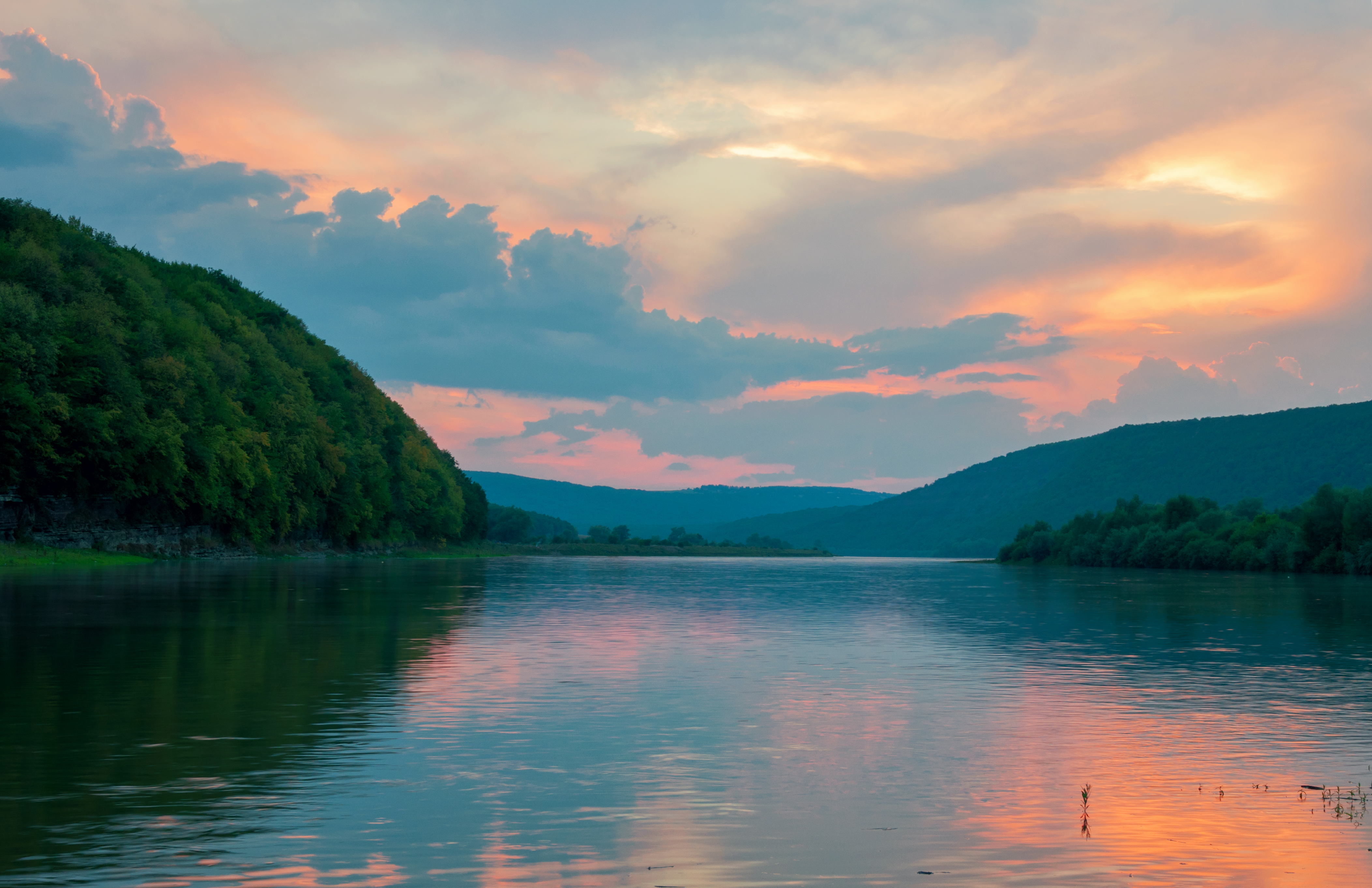 «Дністровський каньйон», Борщівський, Бучацький, Заліщицький, Монастириський райони, кв.кв. 5-13, 16-24, 49, 50, 55-67, 69, 74, 86-88 Дорогичівського лісництва, кв.кв. 33, 50-52, 54-66, 69-80 Язловецького лісництва, кв.кв. 21, 23-30, 71, 80-83 Золотопотіцького лісництва, кв.кв. 83-86 Коропецького лісництва ДП «Бучацьке лісове господарство», кв.кв. 56-62 Наддністрянського лісництва, кв.кв. 16 вид. 1 Гермаківського лісництва, кв.кв. 52-54, 58-61, 80-83, 90-93 Мельнице-Подільського лісництва, кв.кв.11, 31-35,21,27,37,42,45-48,38-42, 64, 74-85 Заліщицького лісництва, кв.,кв.2 вид.7 Шупарського лісництва ДП «Чортківське лісове господарство»